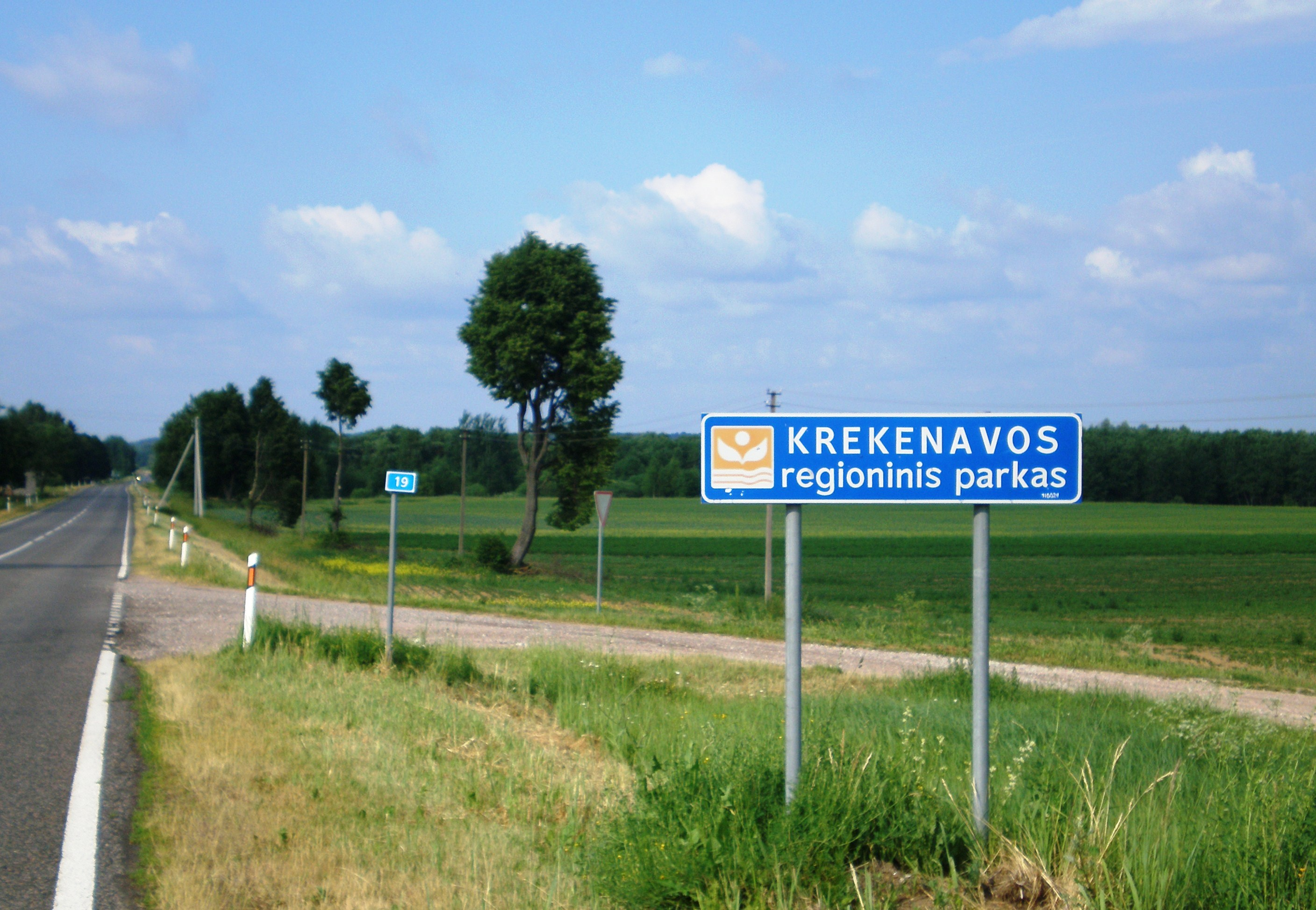 Įvažiavimas į Krekenavos regioninį parką už Surviliškio